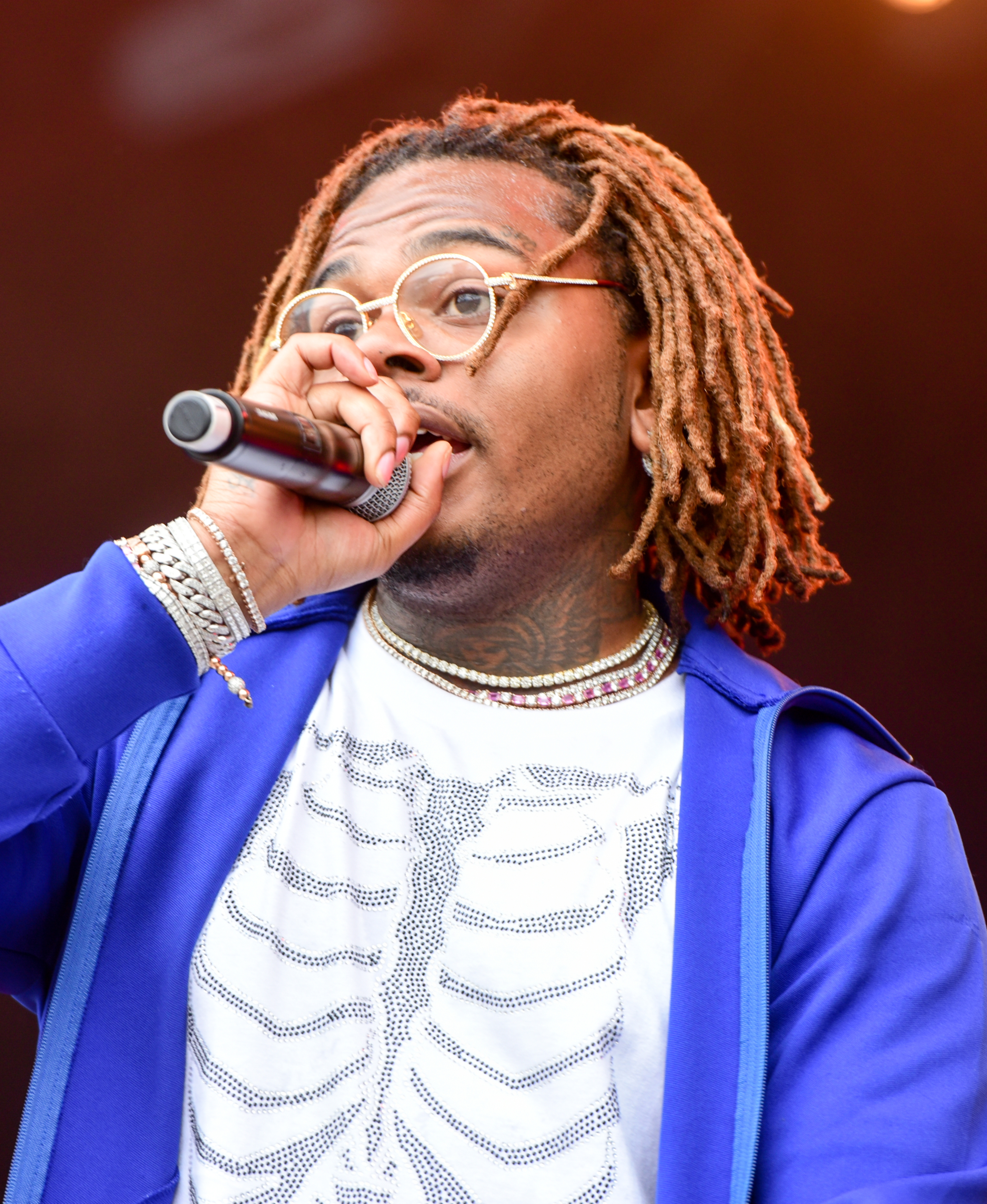 Gunna live auf dem Openair Frauenfeld 2019